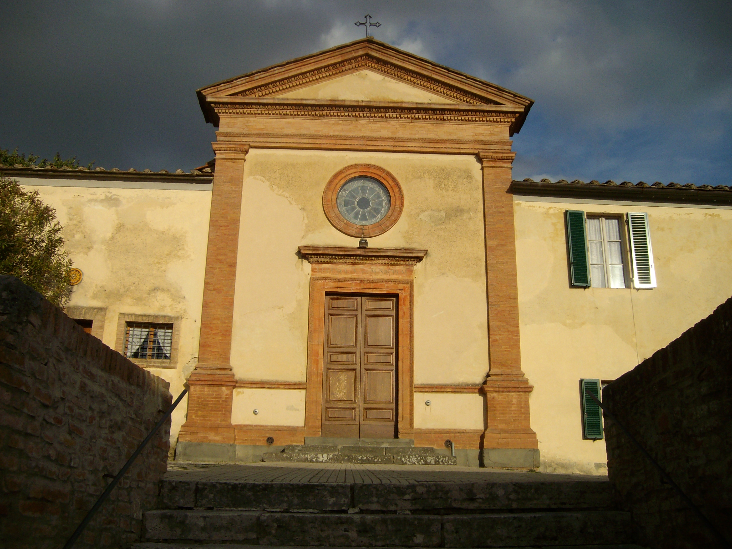 Sant'Eugenia (Siena)